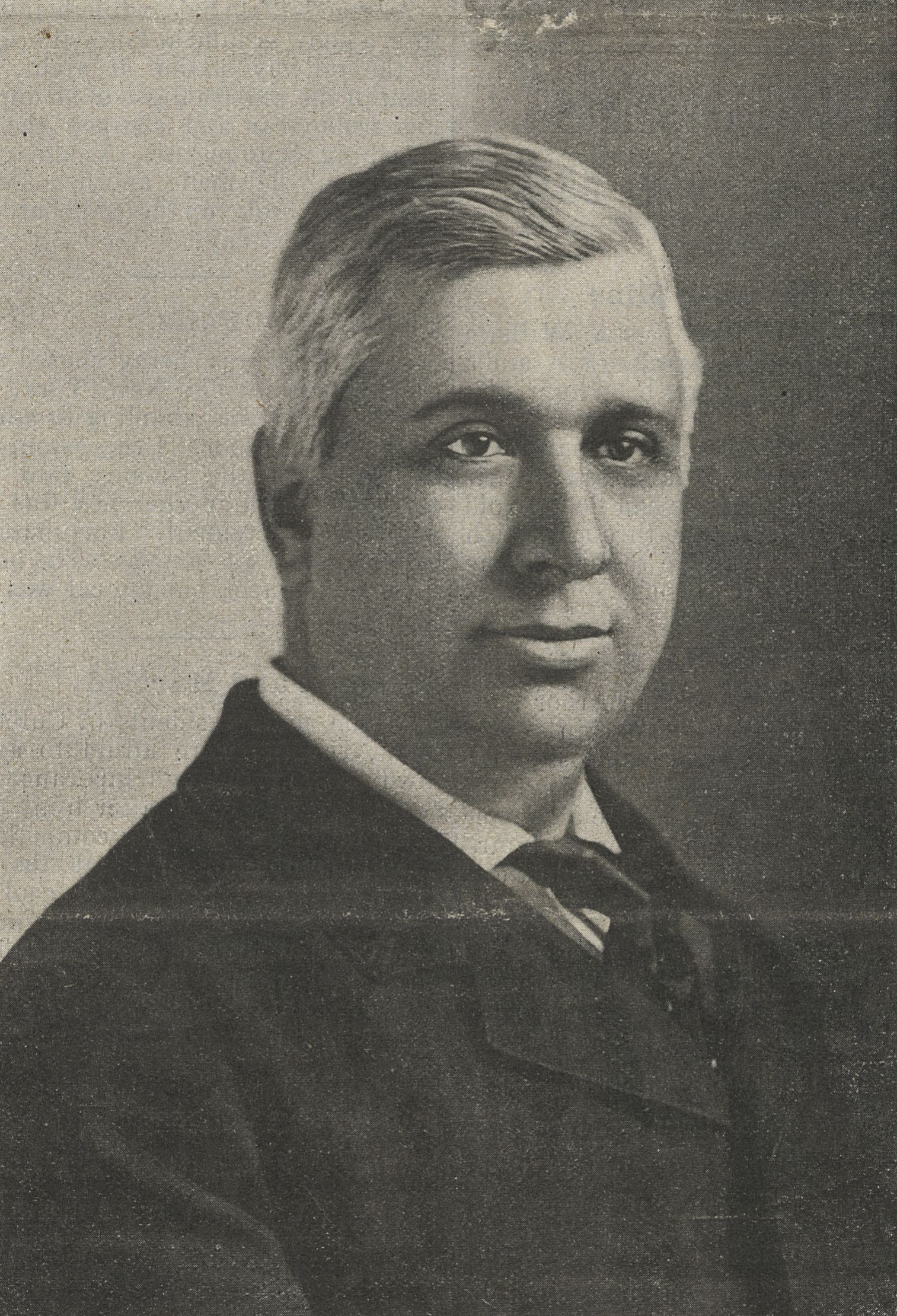 Paul M. Potter.